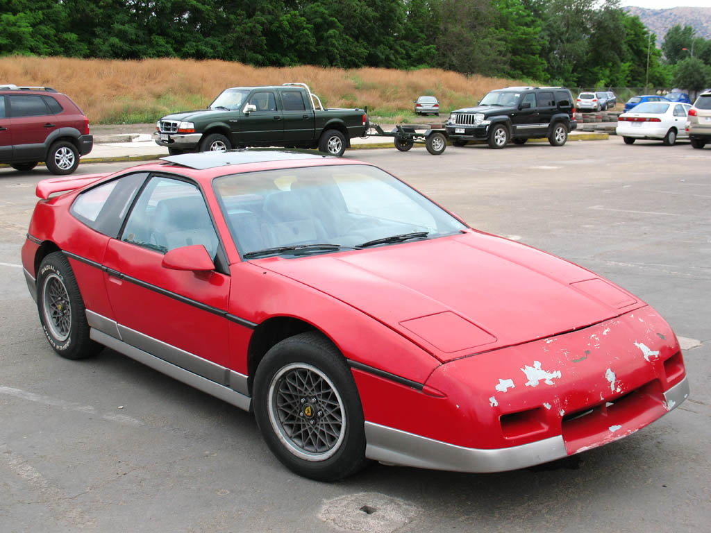 Pontiac Fiero GT 1986